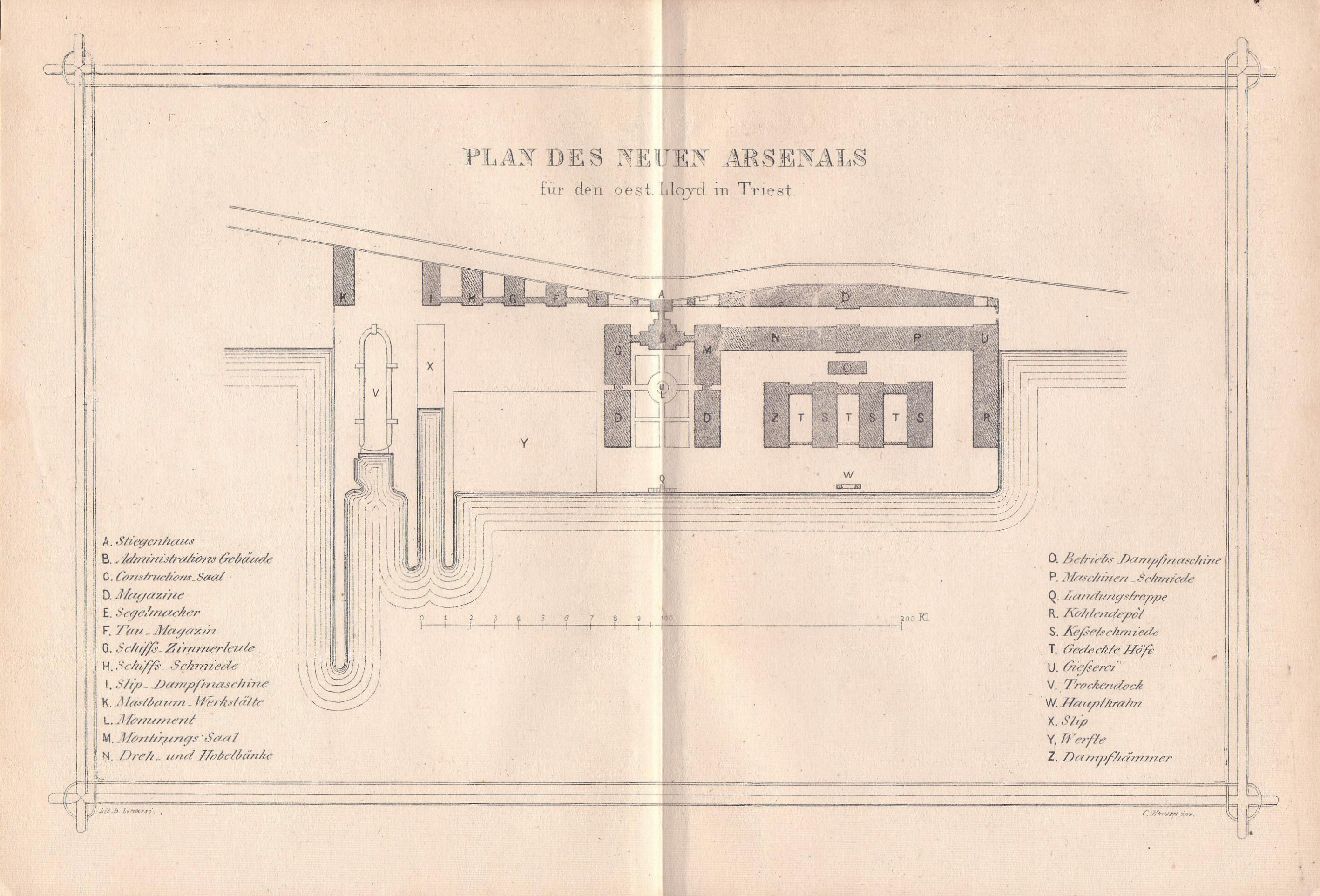 Lloyd's Ill. Reisebibliothek: Triest 1857, Stahlstich Neues Arsenal